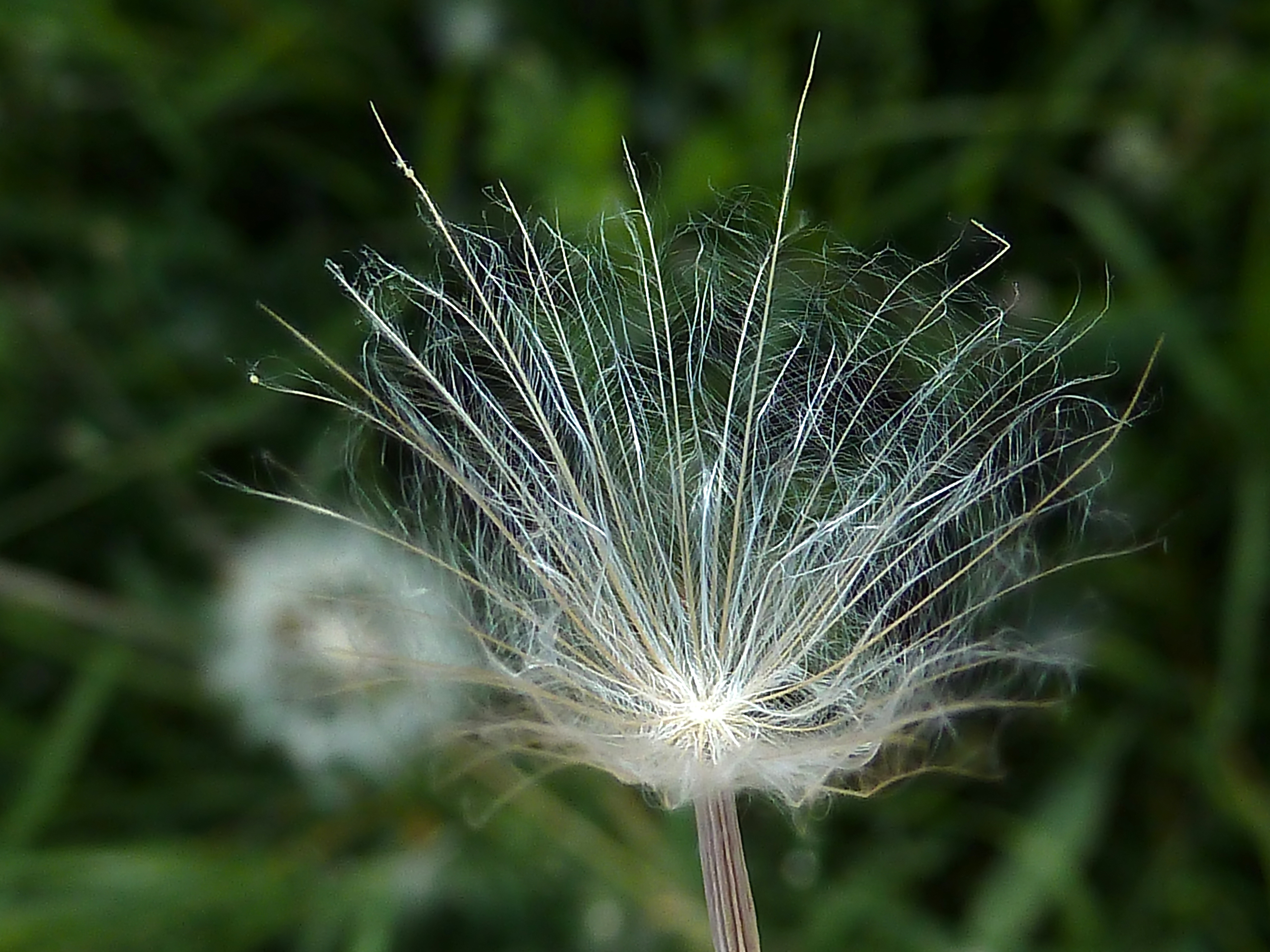 Podospermum laciniatum - Vilano: detalle. - Camino de la Azarbe de Patricio, Albatera (Provincia de Alicante, España).